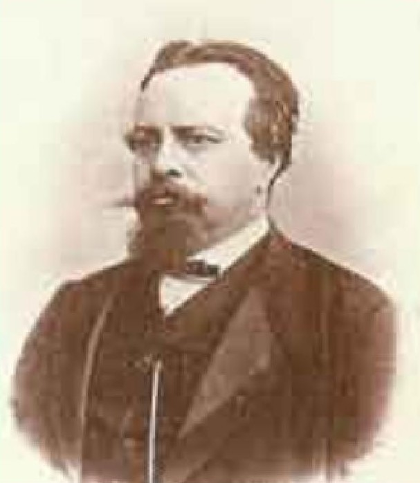 politik Emanuel Tuschner (1828-1882)